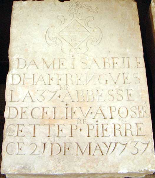 La pierre tombale de l'une des abbesses de l'abbaye de Beaupré est visible à la salle du patrimoine de l'association Abbaye de Beaupré Etude et sauvegarde du Site, rue du 8 Mai 145 (face à l'église Saint Pierre de La Gorgue) ; ce n'est cependant pas la pierre tombale de l'abbesse du lieu: Le président Bultel, dans sa Notice sur l'état ancien et moderne de la province et comté d'Artois, dit que Isabelle d'Haffringhe fut nommée abbesse en 1747. Le Registre au vêtures et sépulture de Beaupré (au greffe du tribunal d'Hazebrouck) nous apprend l'année de sa mort : Isabelle d'Affringhe, abbesse, âgée de 62 an, professe de 45, meurt le 2 avril 1747, est inhumée le 22 [réf: Annales du Comité Flamand de France, tome 16, Dunkerque, 1887, page 271]).